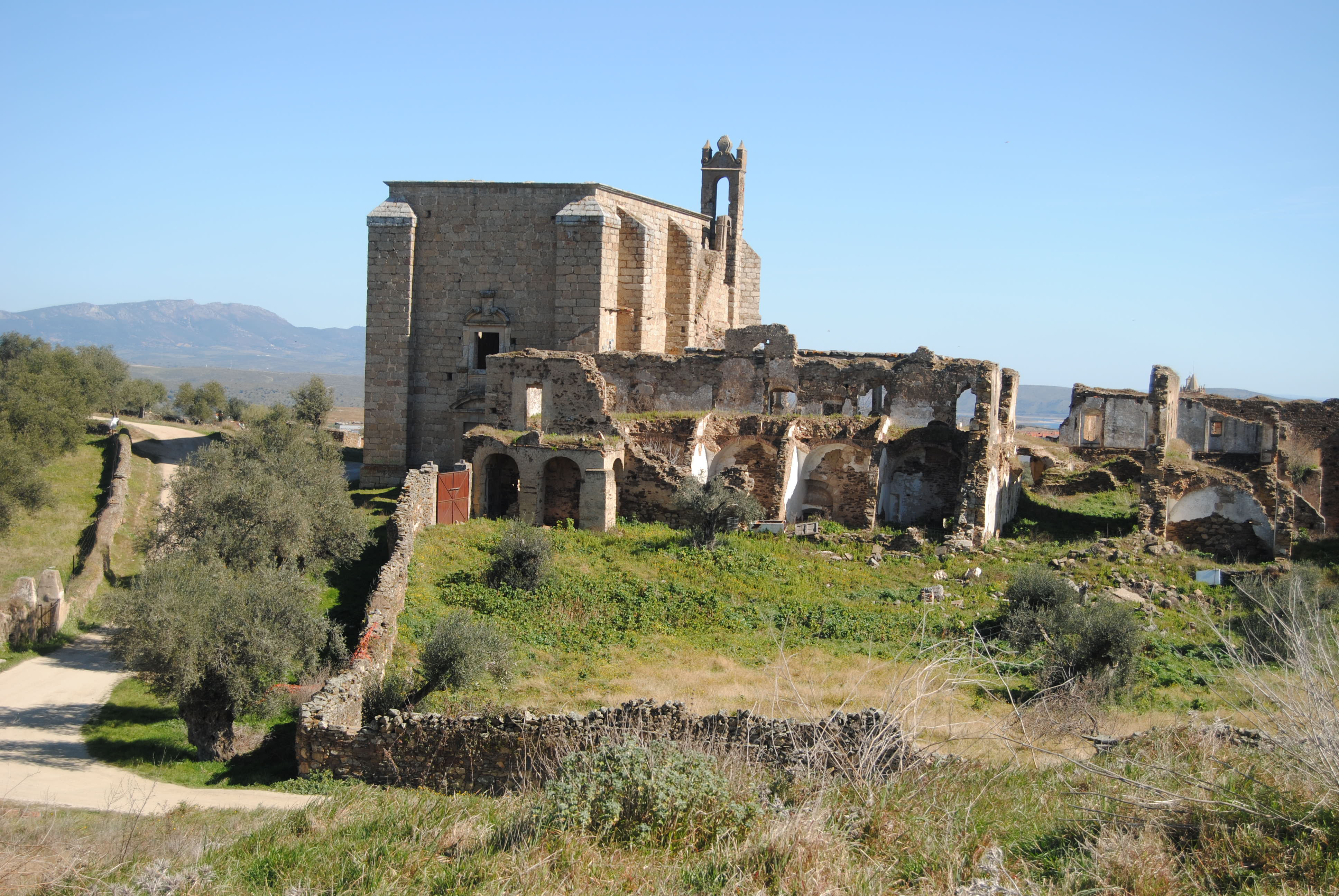 Convento franciscano de San Antonio de Padua, Garrovillas de Alconétar, provincia de Cáceres, España.